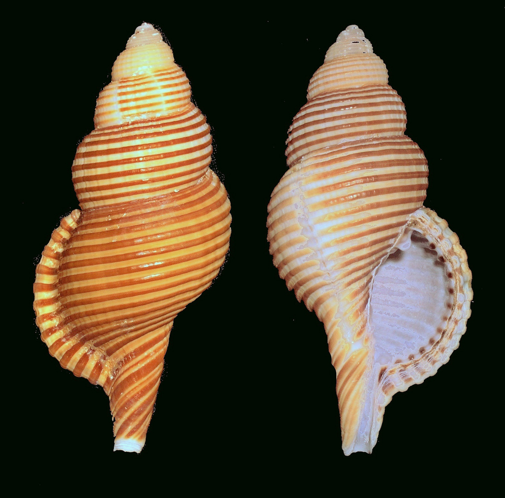 Gelagna succincta (Linnaeus, 1771) (synonym : Linatella succincta)